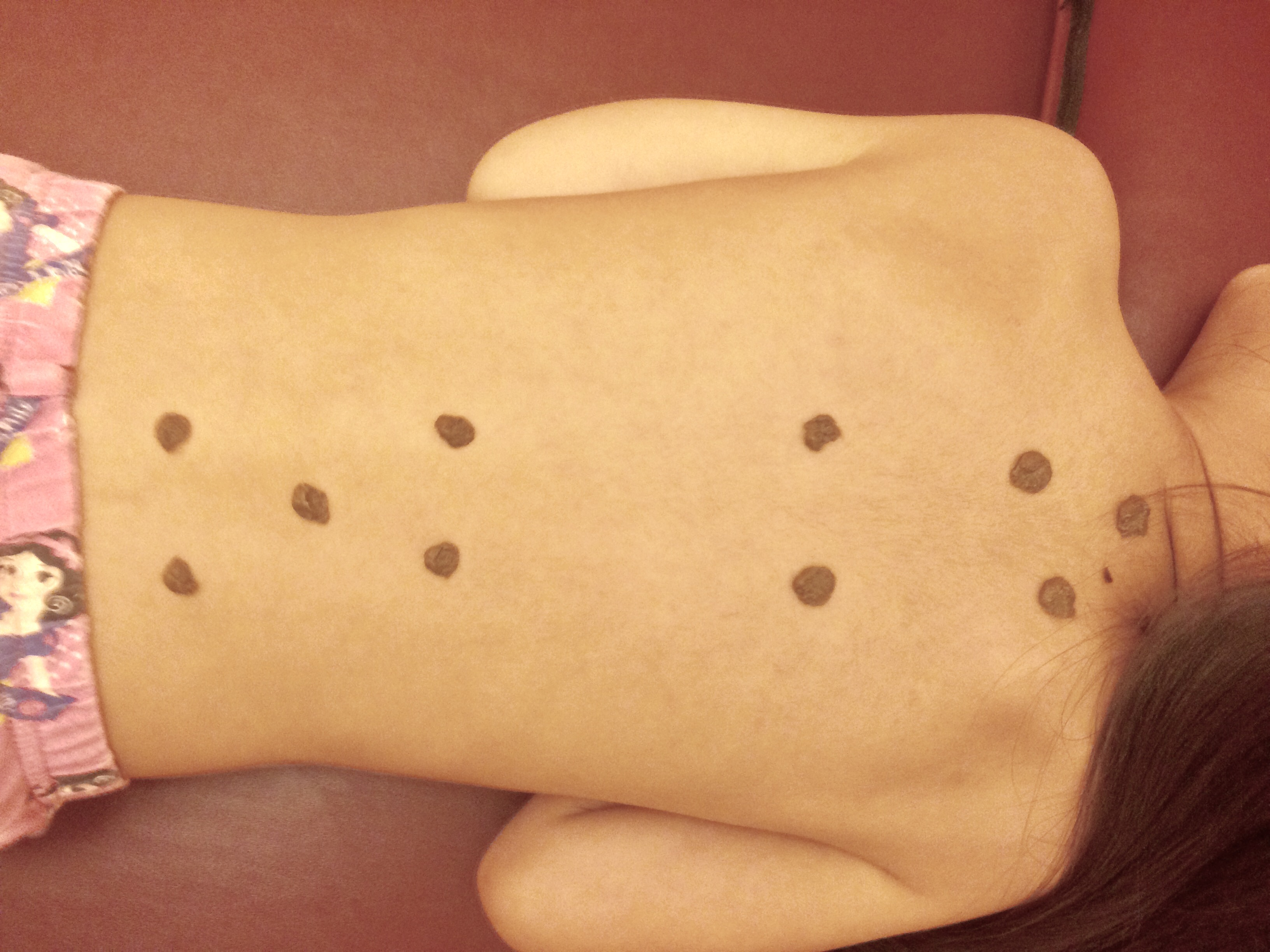 中文（台灣）: 中醫療法三伏貼